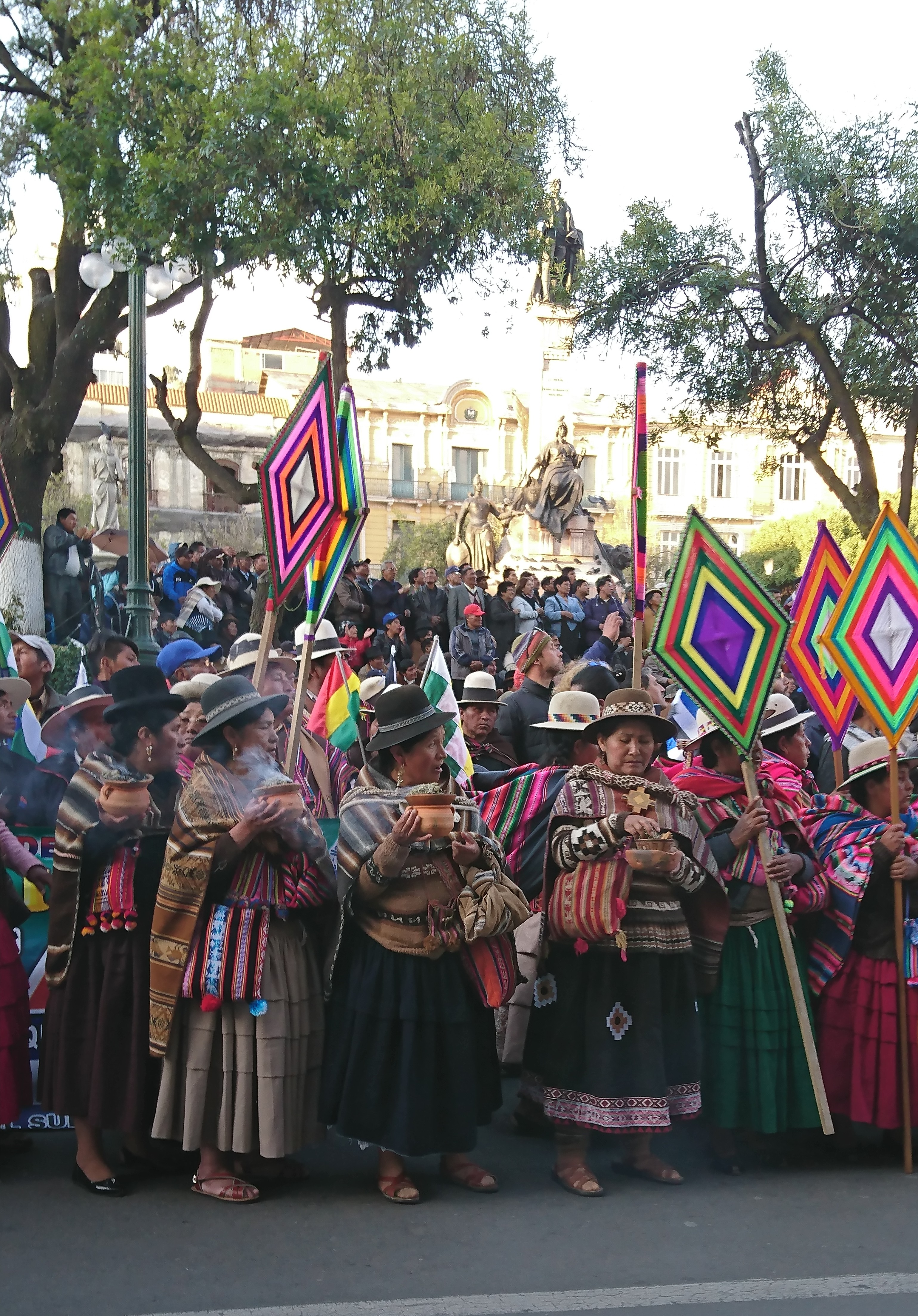 grupo de amautas en Plaza Murillo, vistas desde la catedral